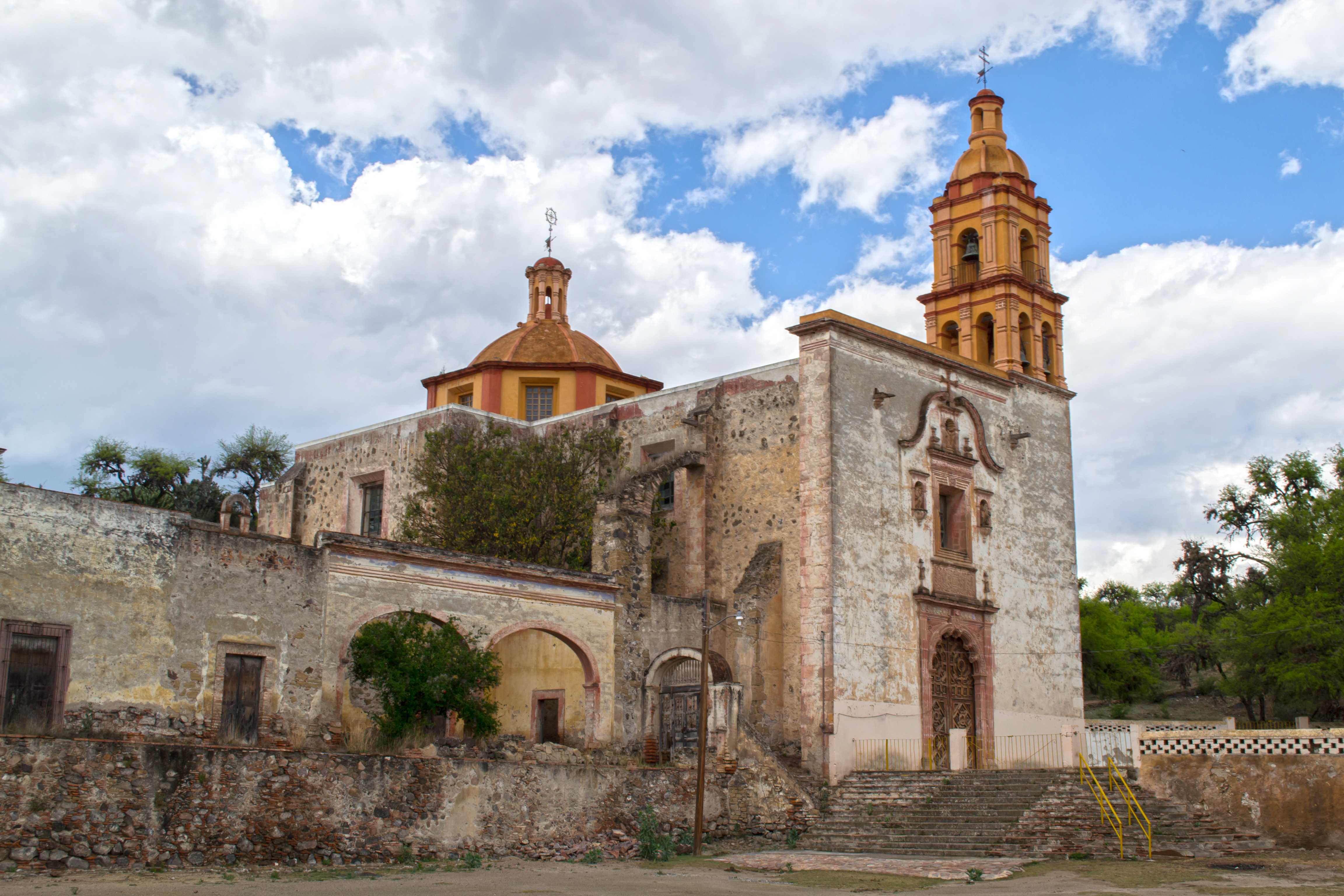 Pozo del Carmen, S.L.P.